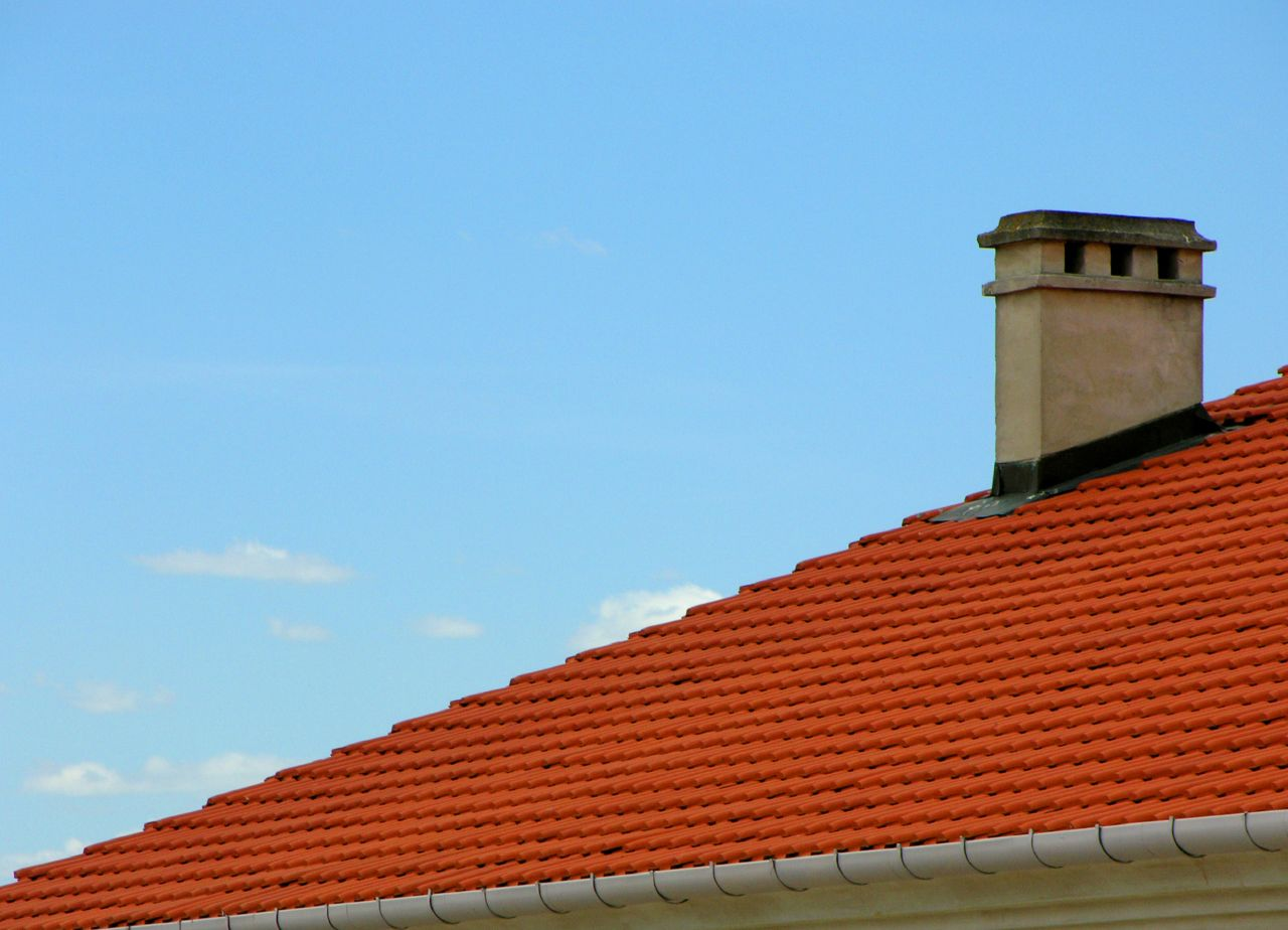 Un abergement, raccordant une cheminée sur un toit en tuiles